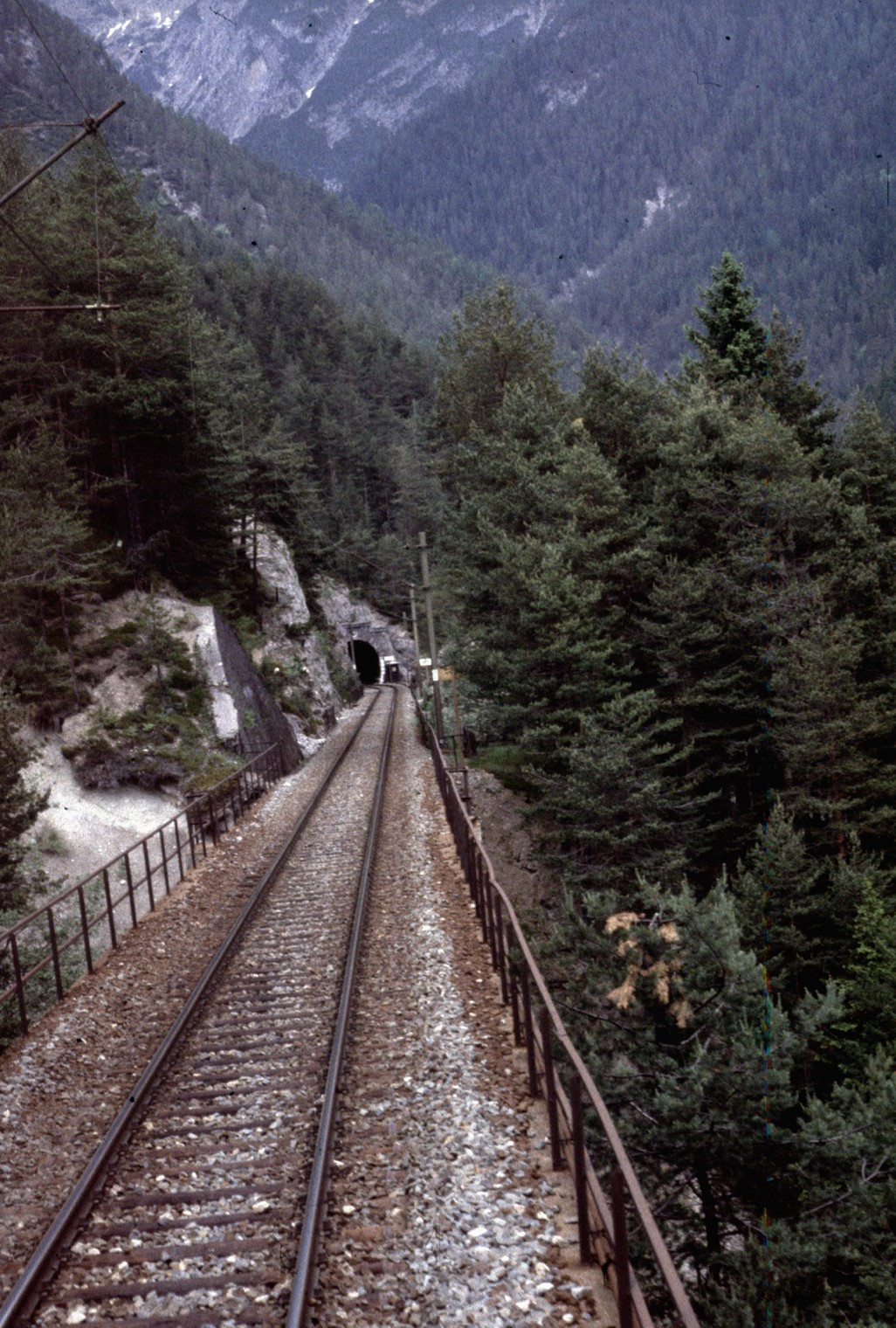 Karwendelbahn auf dem Abschnitt Seefeld-Innsbruck, Blick über das Lehnenviadukt zum Nordostportal des Fragensteintunnel